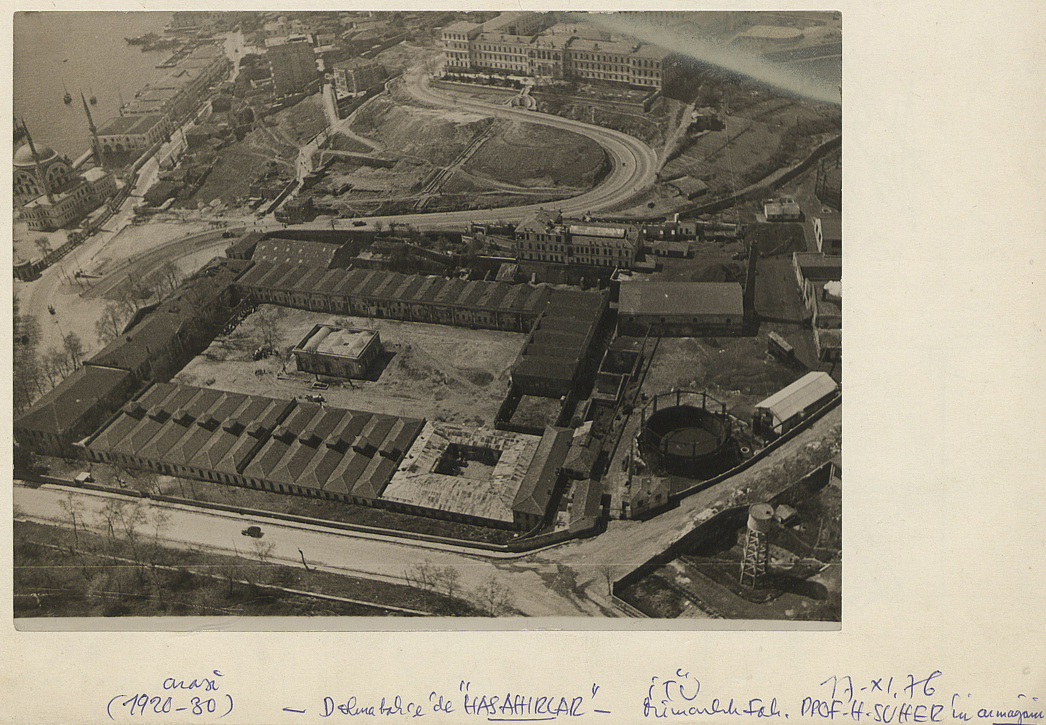 Dolmabahçe, Imperial Stables, İstanbul, 1920s SALT Research, Harika and Kemali Söylemezoğlu Archive Dolmabahçe, Has Ahırlar, İstanbul, 1920'ler SALT Araştırma, Harika ve Kemali Söylemezoğlu Arşivi